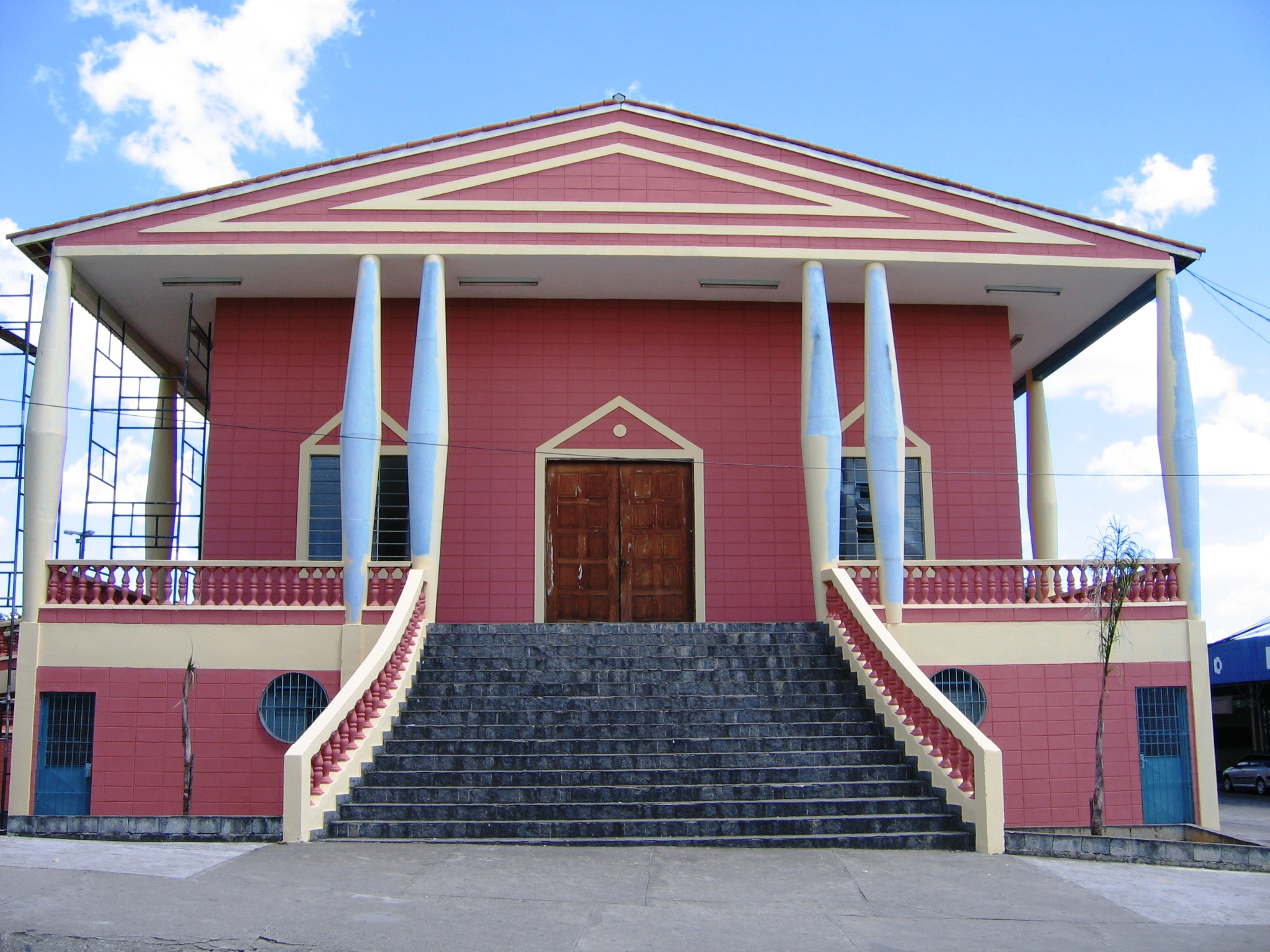 Mercado Municipal de Embu-Guaçu